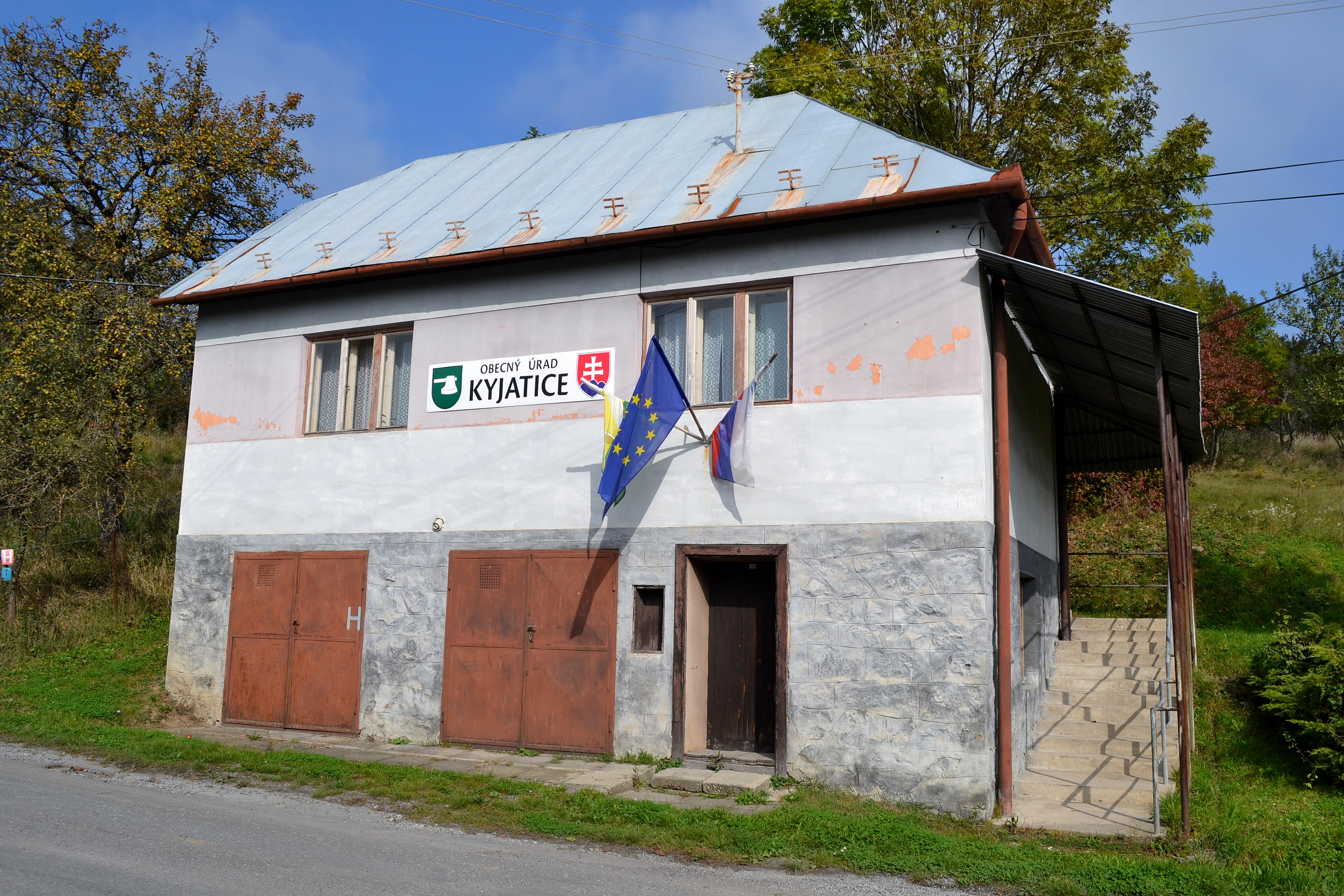 Budova obecného úradu v Kyjaticiach